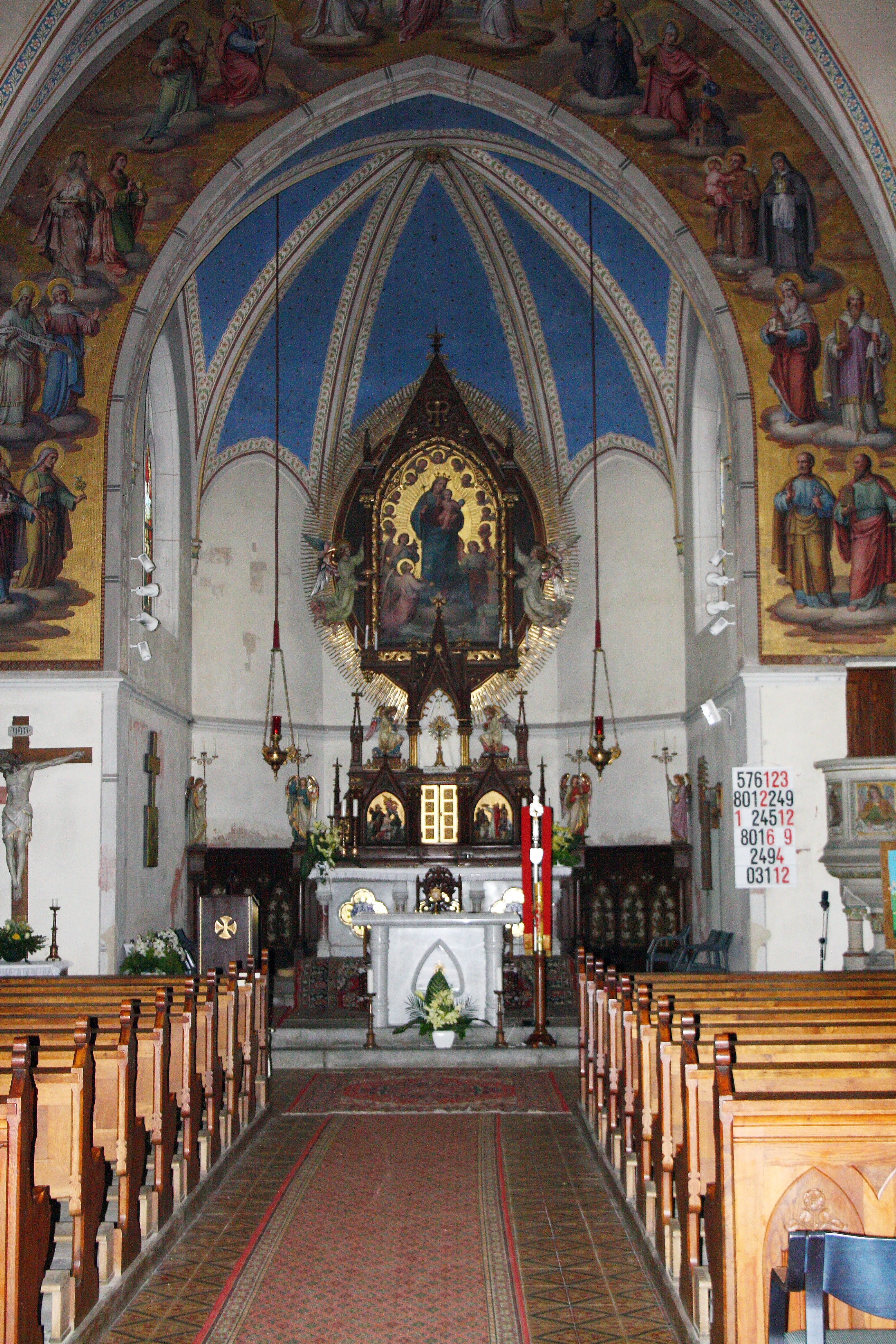 Die Innenansicht Richtung Altar der Pfarr- und Wallfahrtskirche Maria Gugging in Niederösterreich.